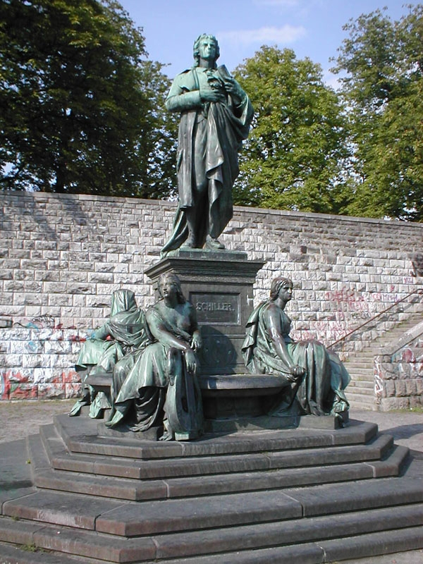 Schillerpark in Berlin-Wedding, Schillerdenkmal, Abguss des Denkmals vom Gendarmenmarkt